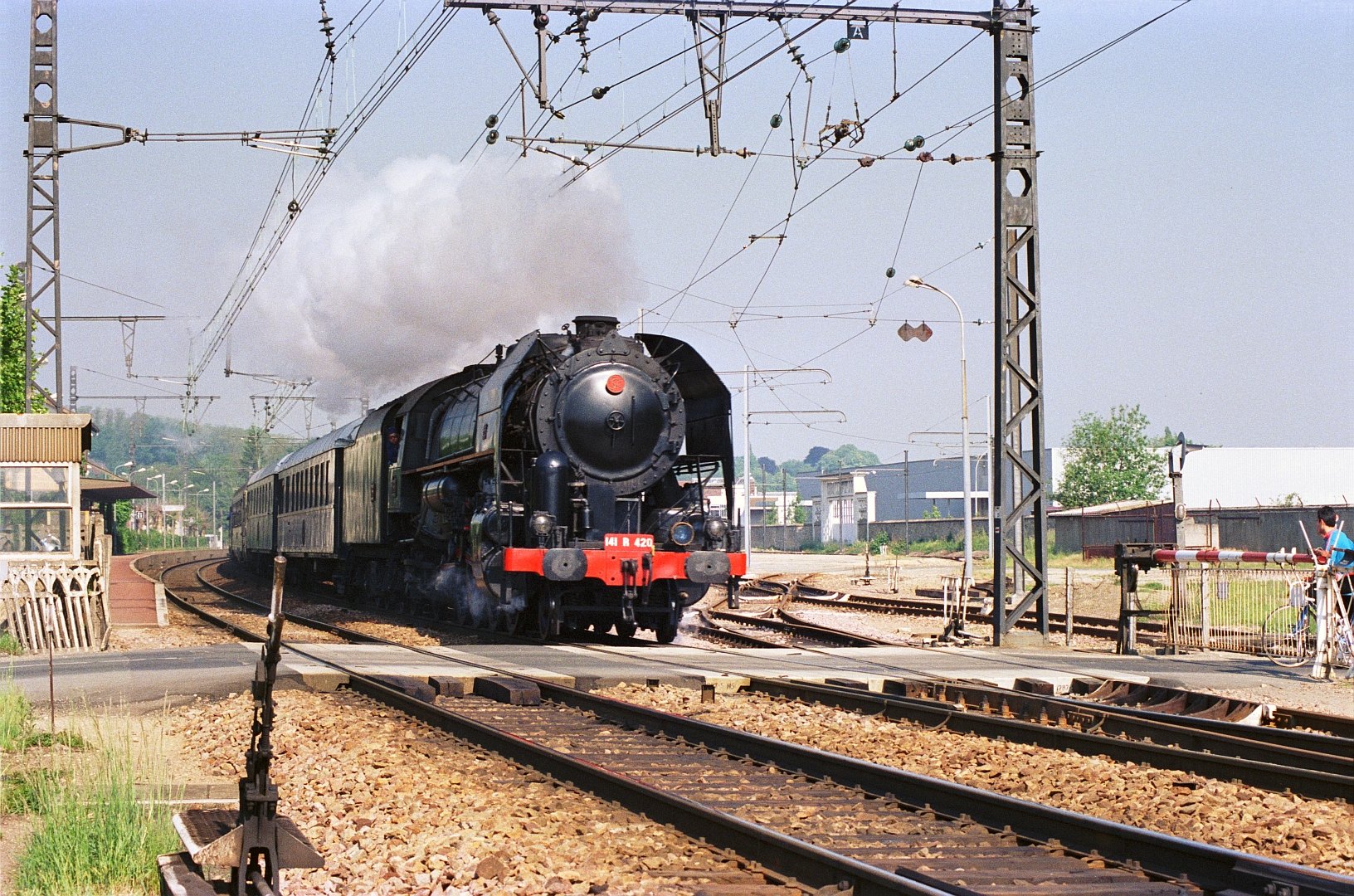 La 141 R 420 passe à Saint-Fargeau-Ponthierry le 24 mai 1987.